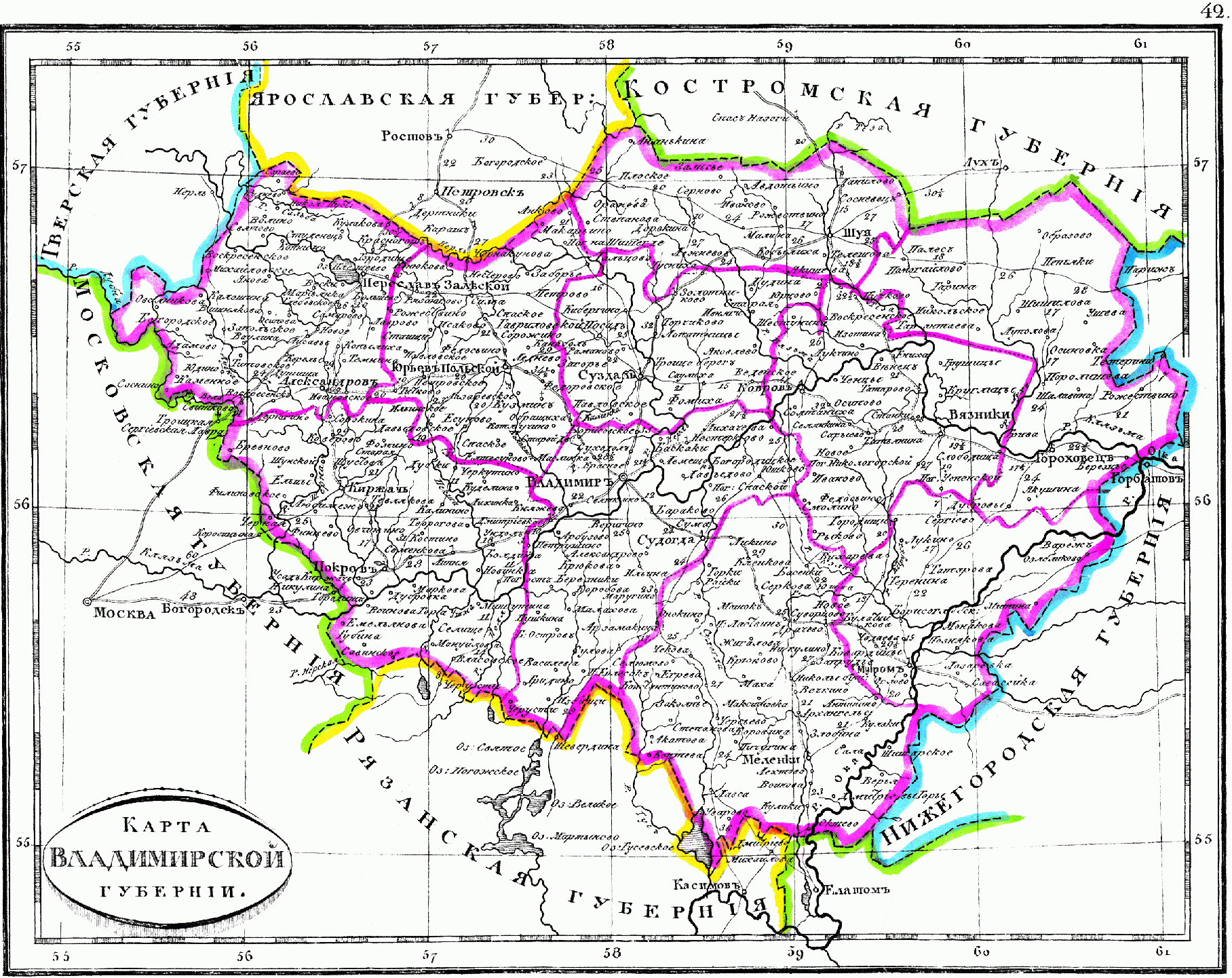 Карта Владимирской губернии, 1835